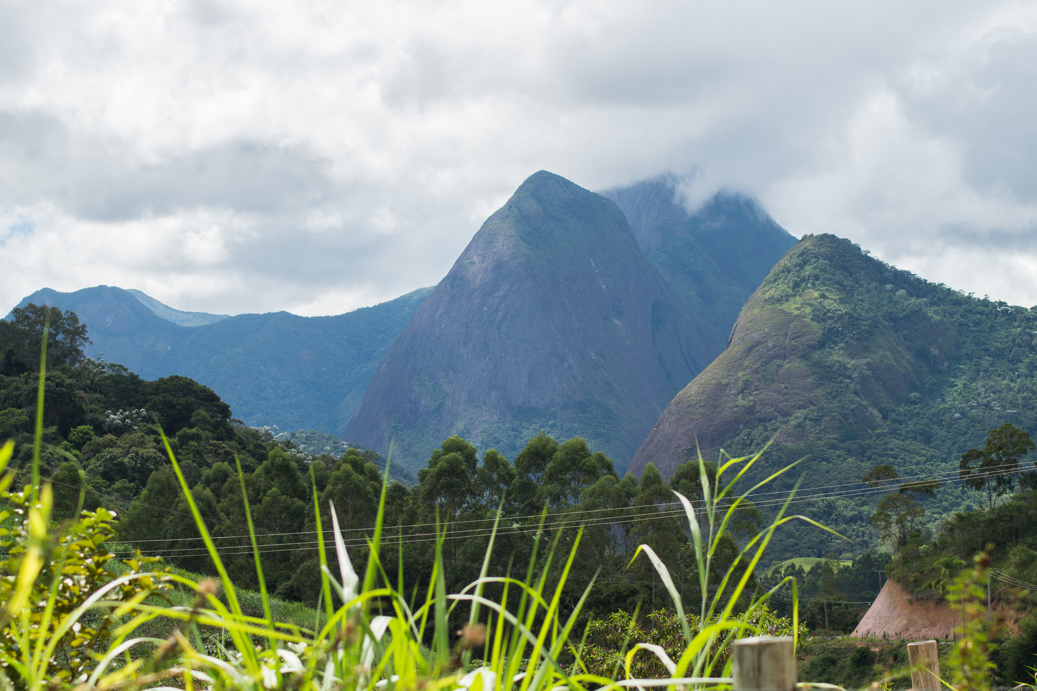 Há 1.761m é o ponto mais alto do Parque.